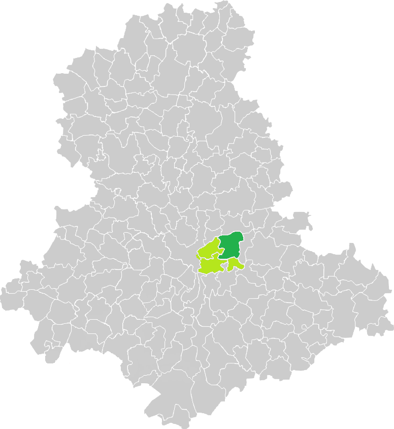 Carte de situation de la commune de Saint-Just-le-Martel (en vert foncé) dans le votre Canton (en vert clair) sur une carte des communes de la Haute-Vienne